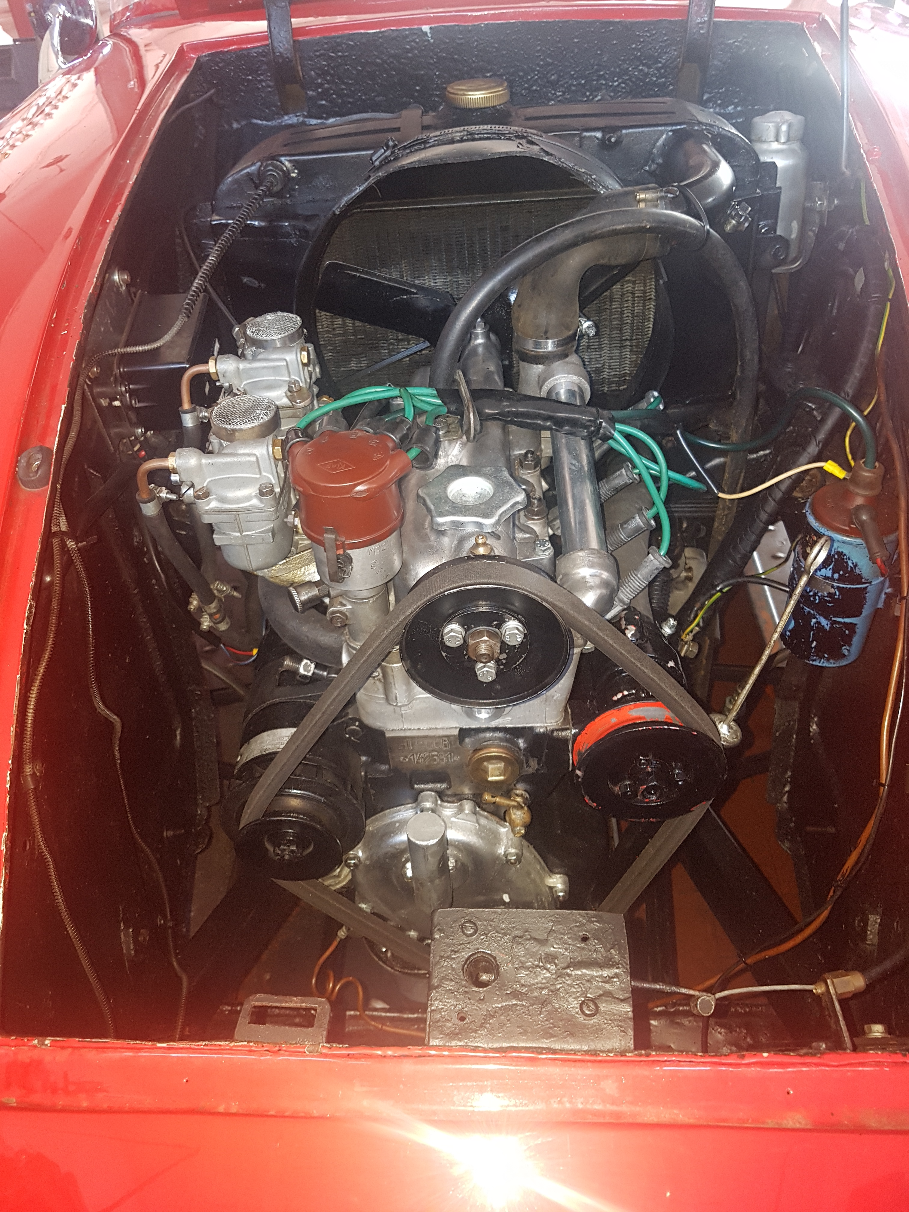 Il motore in dettaglio con tutte le modifiche rispetto al classico della Topolino B